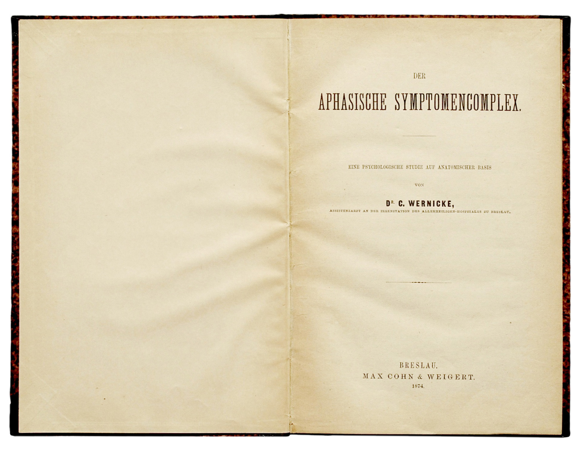 Carl Wernicke, der aphasische Symptomkomplex Erstveröffentlichung 1874